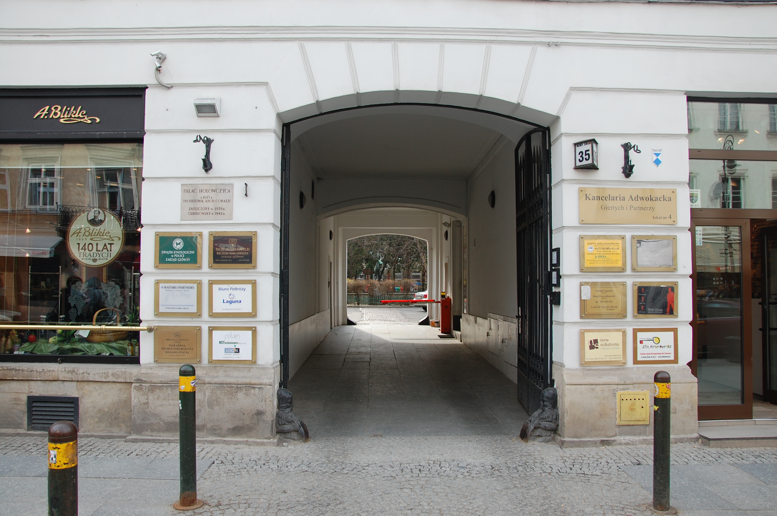 Przejście pod Pałacem Hołowczyca